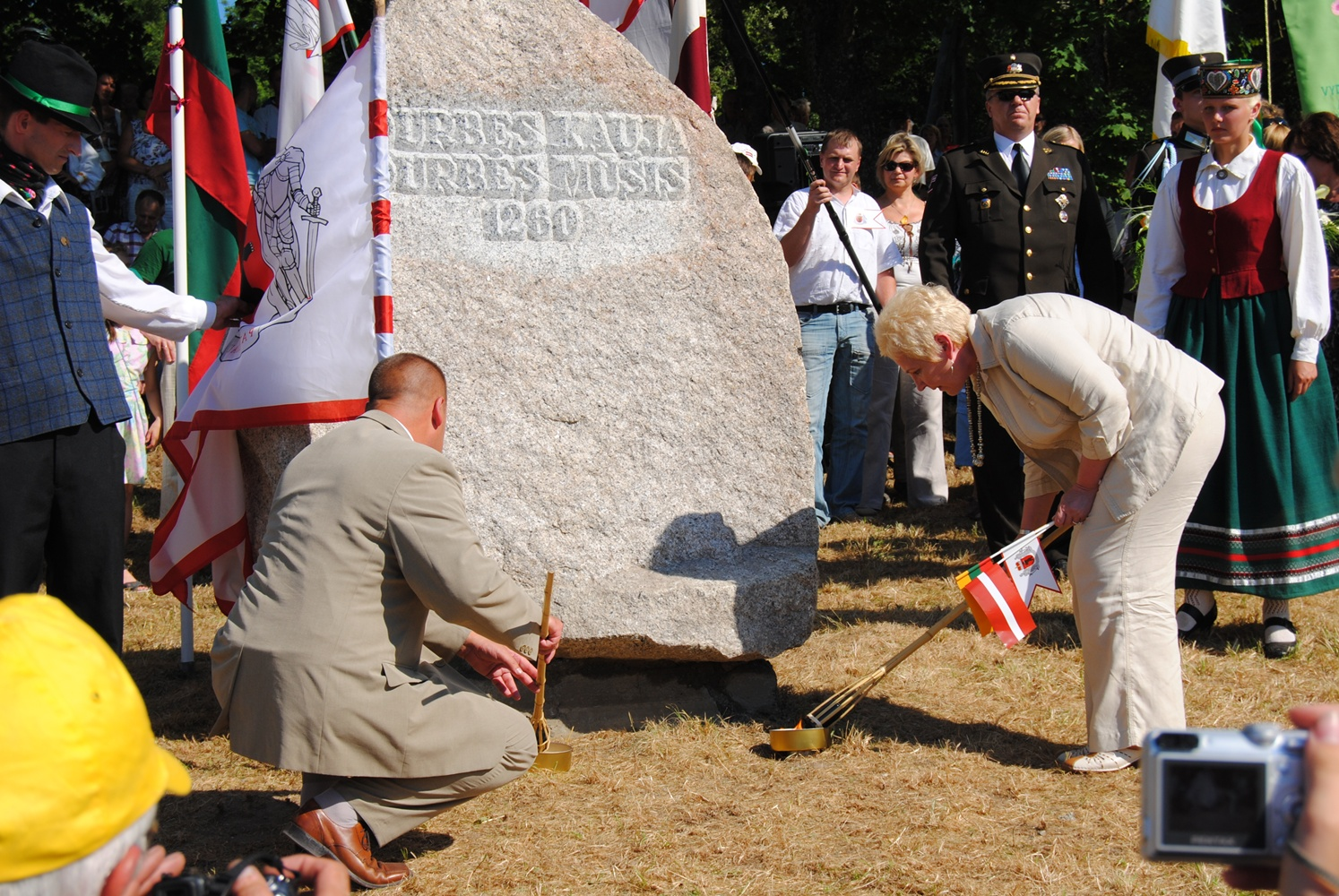 Lietuvas Seima priekšsēdētāja Irena Degutiene un Saeimas priekšsēdētājs Gundars Daudze Durbes kaujas 750.gadadienas atceres pasākumā. Foto: Saeima